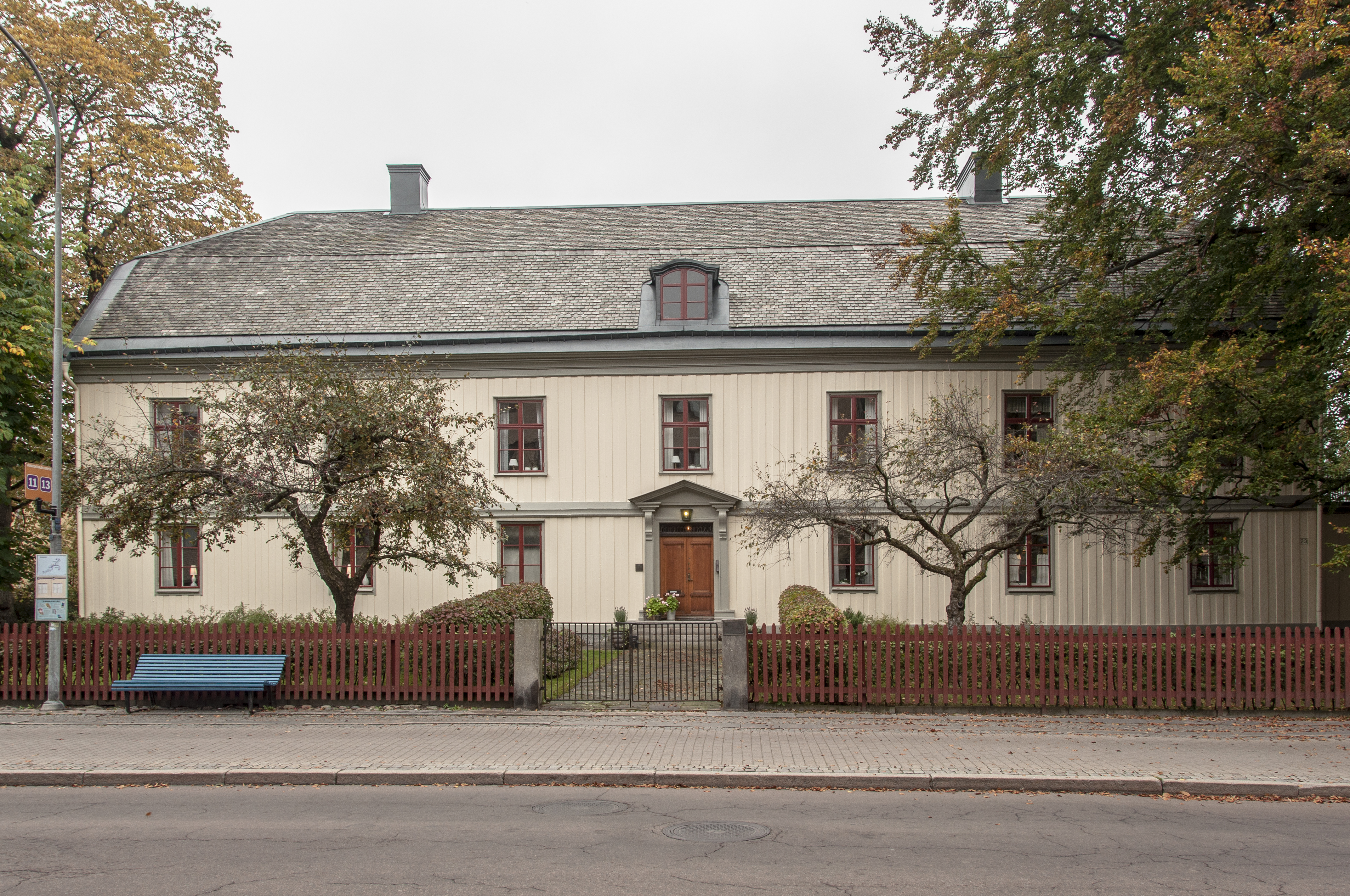 Biskopsgården, Karlstad. Uppförd på 1770-talet